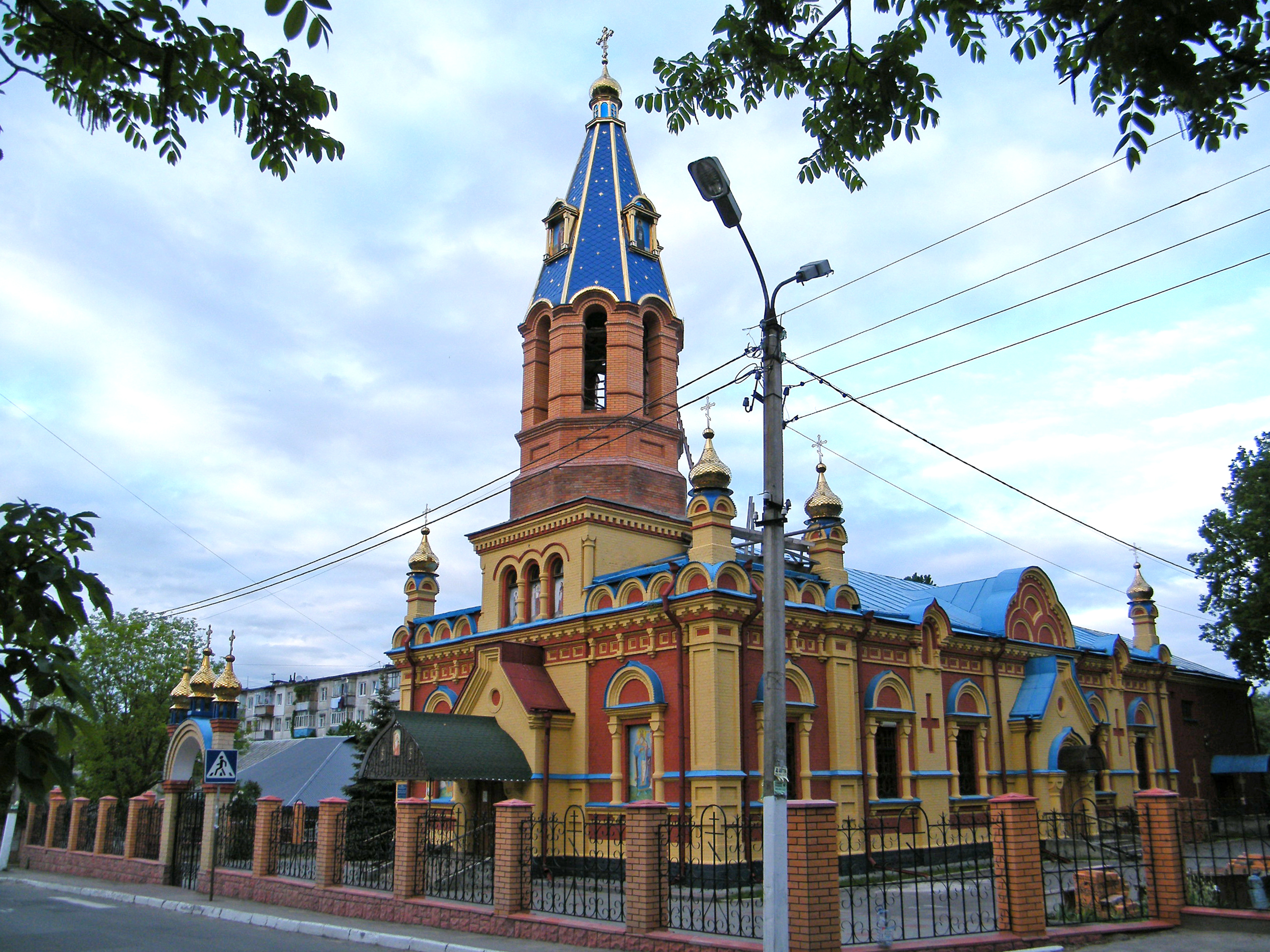 Собор Андрея Первозванного